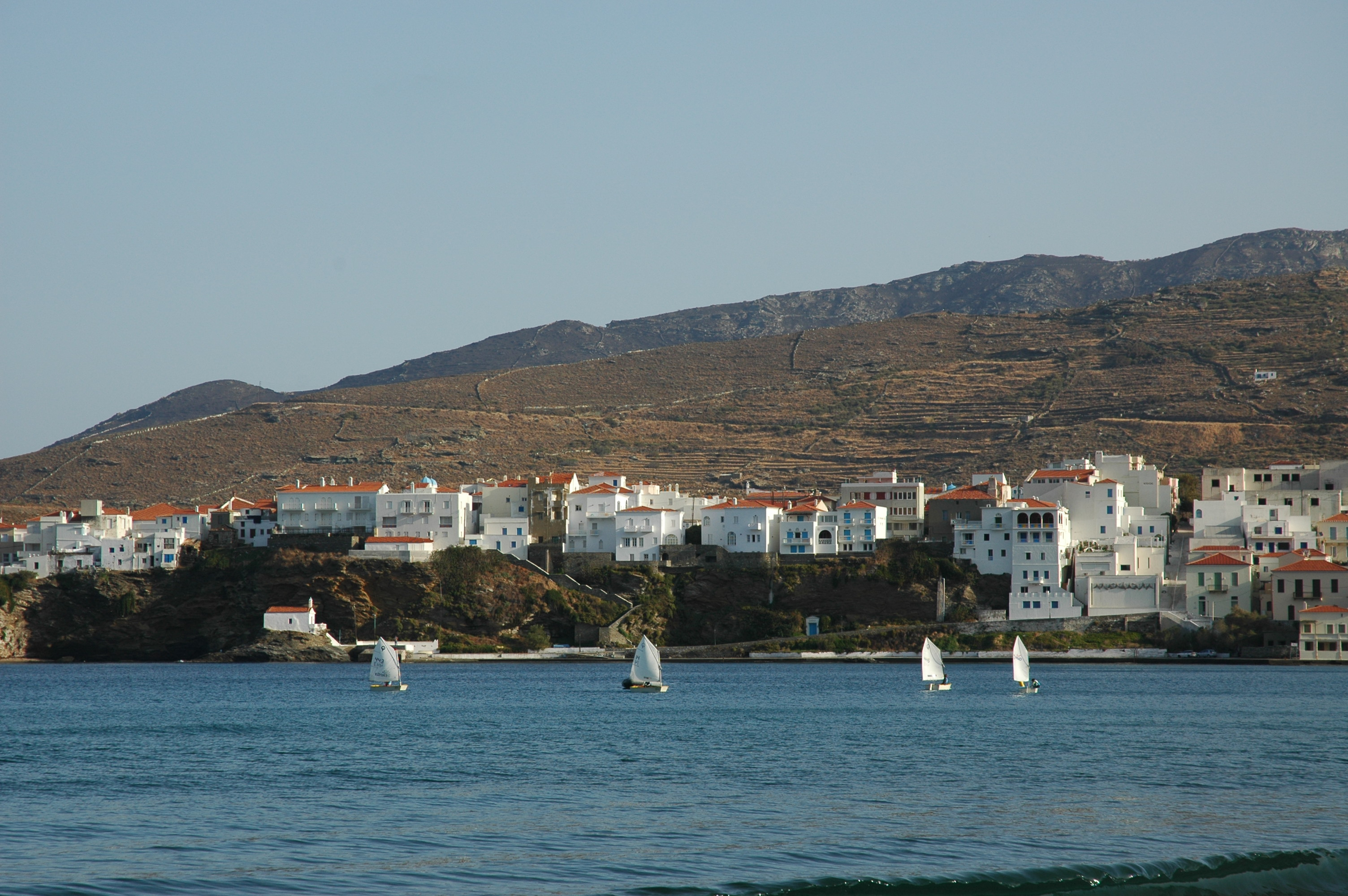 Άποψη της Χώρας της Άνδρου με το εκκλησάκι της Παναγίας Θαλασσινής